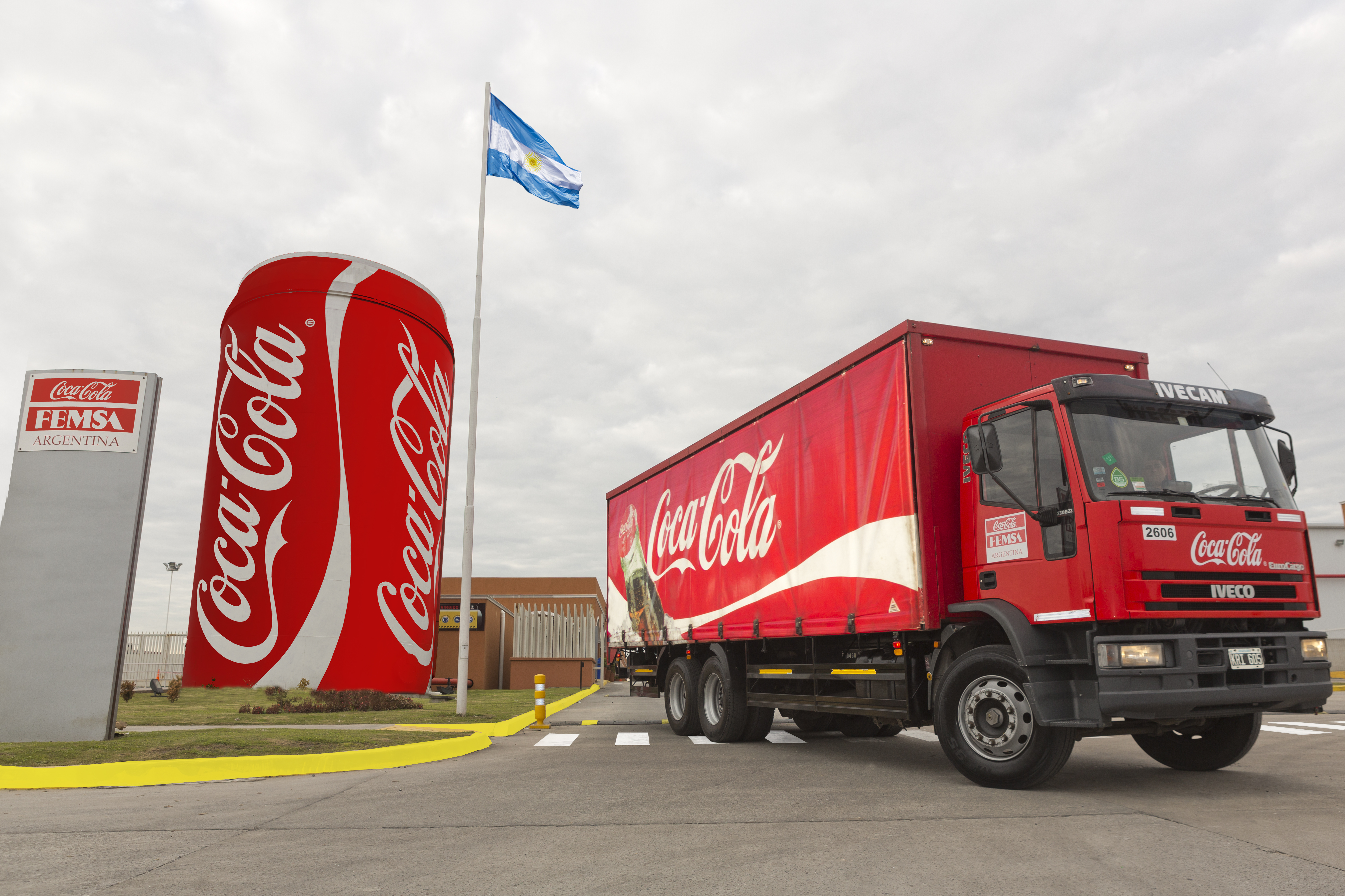 Coca-Cola FEMSA Argentina